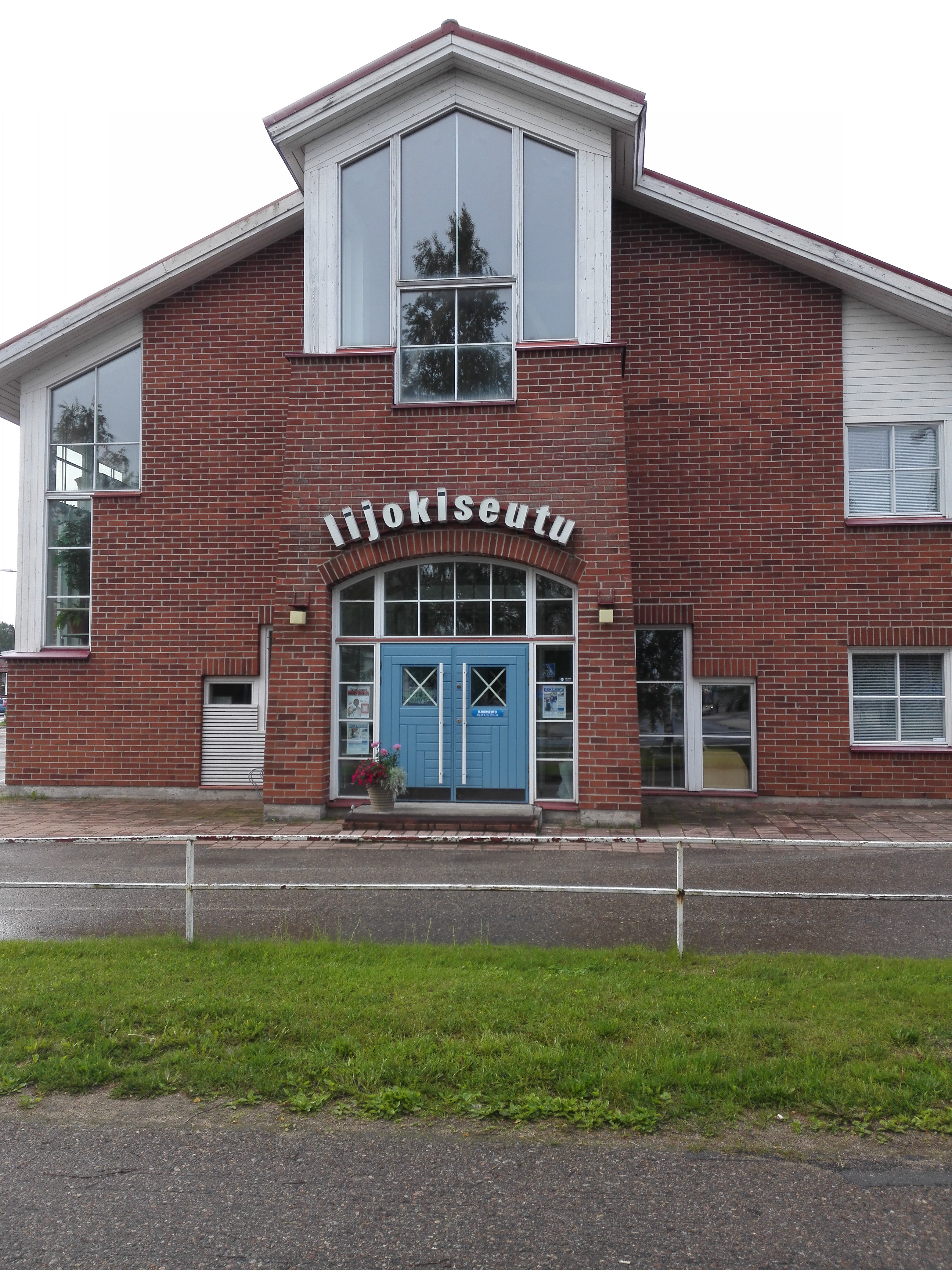 Suomalaisen paikallislehti Iijokiseudun toimituksen tilat Pudasjärven keskustaajamassa Kurenalla.